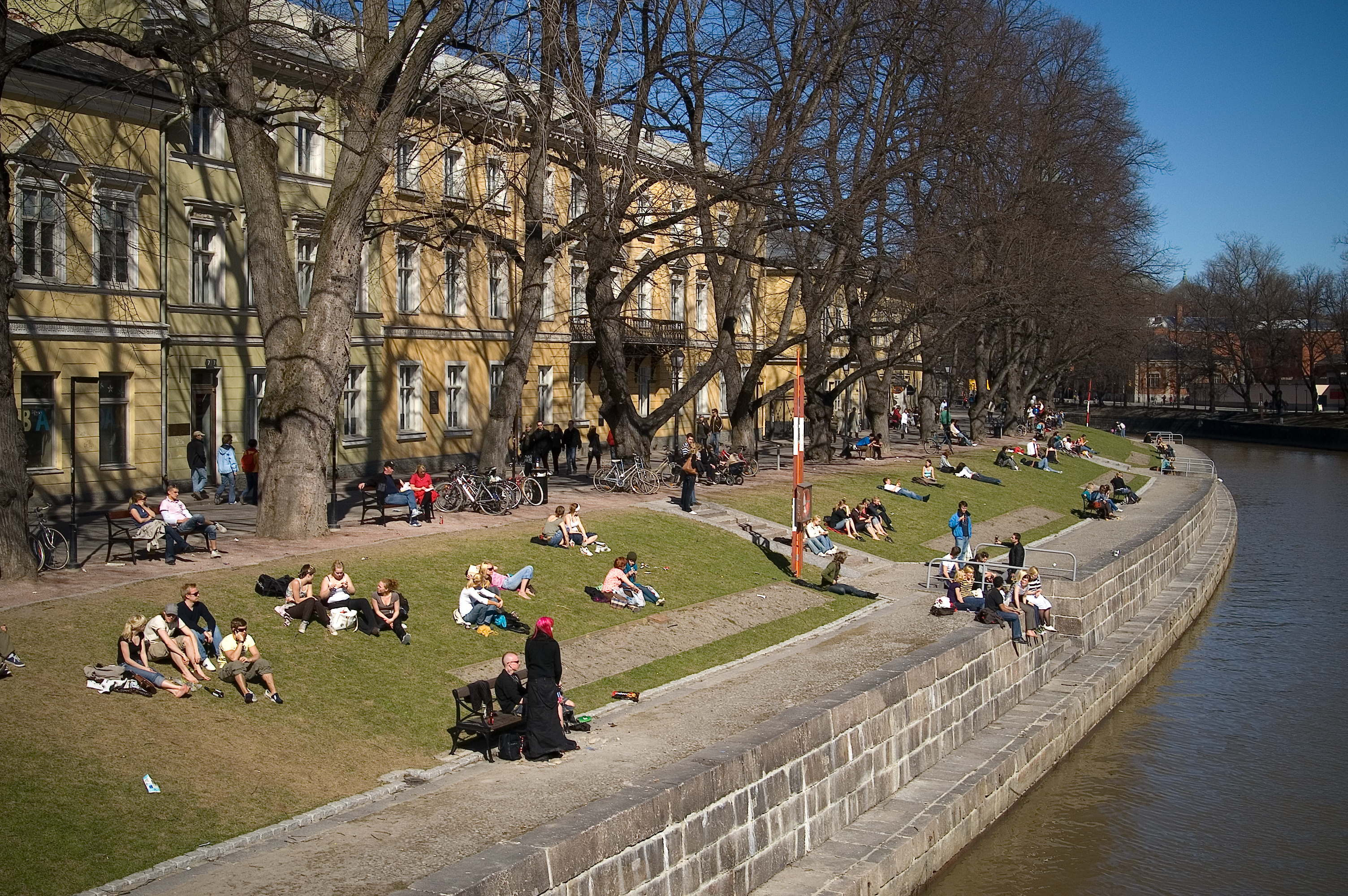 Aurajoen länsirantaa Aurasillalta kuvattunapaistattelijat